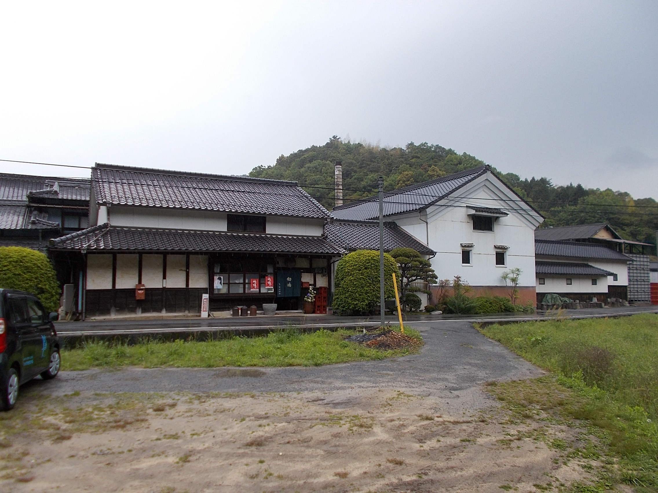 盛川酒造、広島県呉市安浦町